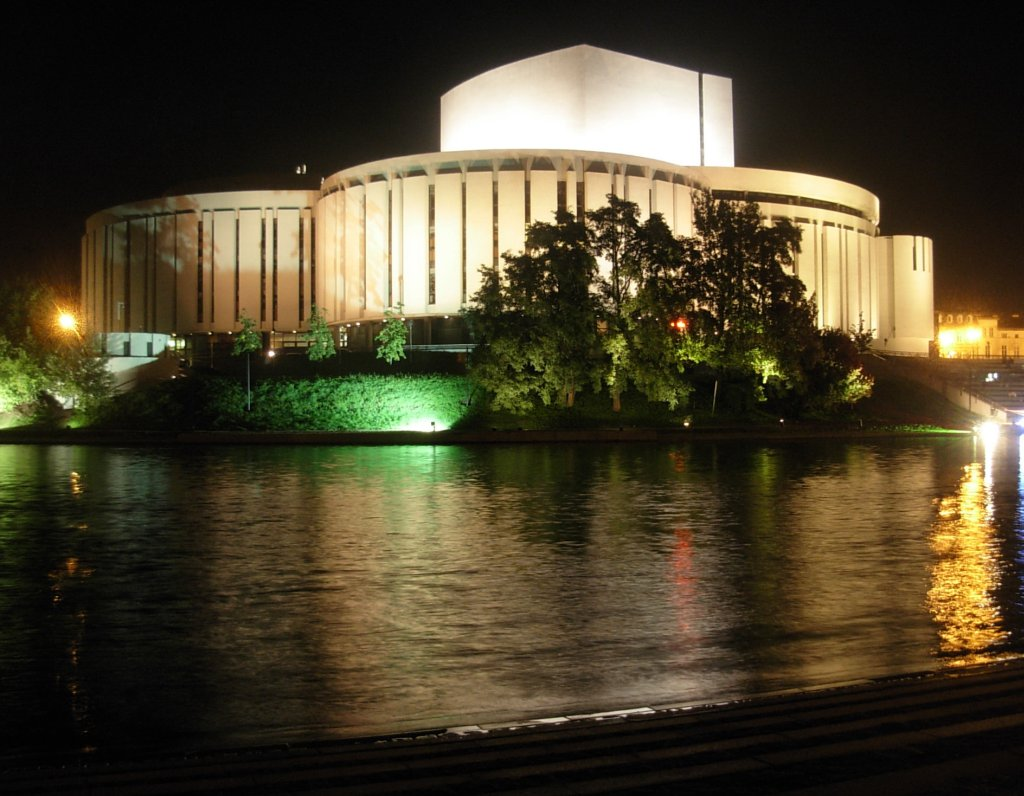 Opera Nova - widok z Wyspy Młyńskiej w Bydgoszczy